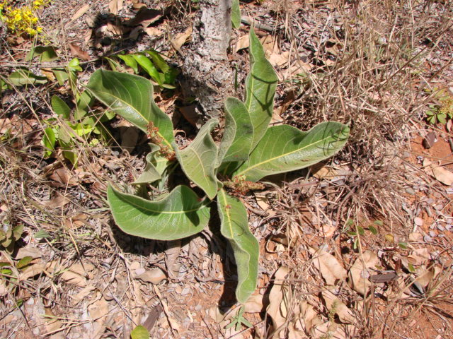 Byrsonima subterranea Brade & Markgr. - MALPIGHIACEAE - Parque Olhos D'Água - Brasília - Distrito Federal - Brasil.